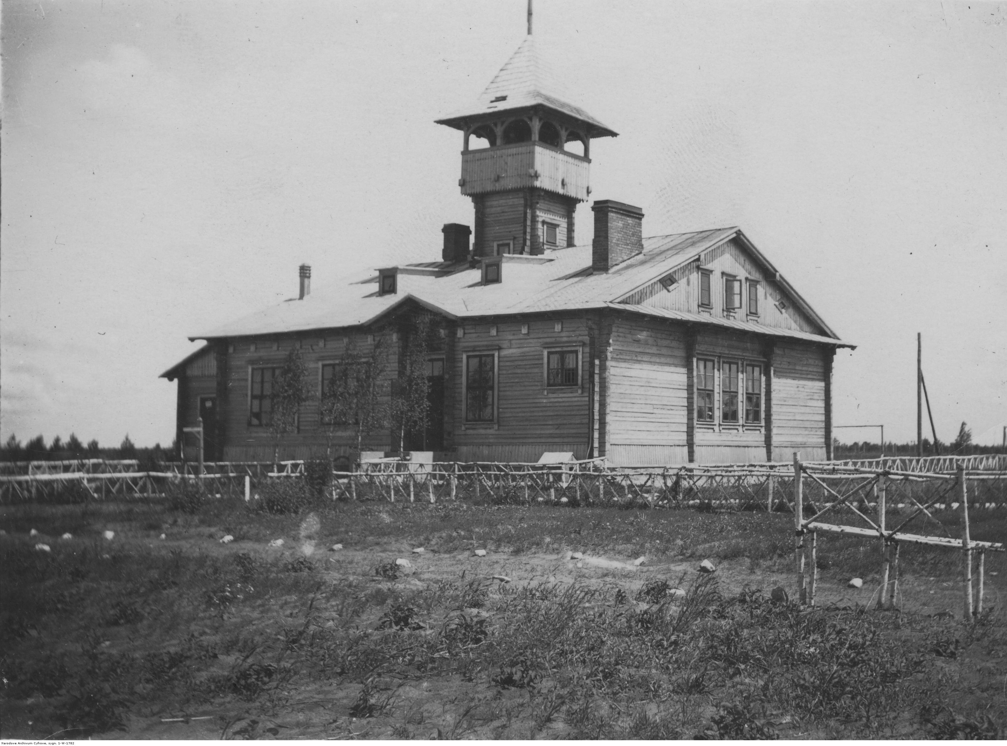 Strażnica 1 Kompanii 7 Batalionu Korpusu Ochrony Pogranicza w okolicy Podświla. Koncern Ilustrowany Kurier Codzienny - Archiwum Ilustracji. Sygnatura: 1-W-1782